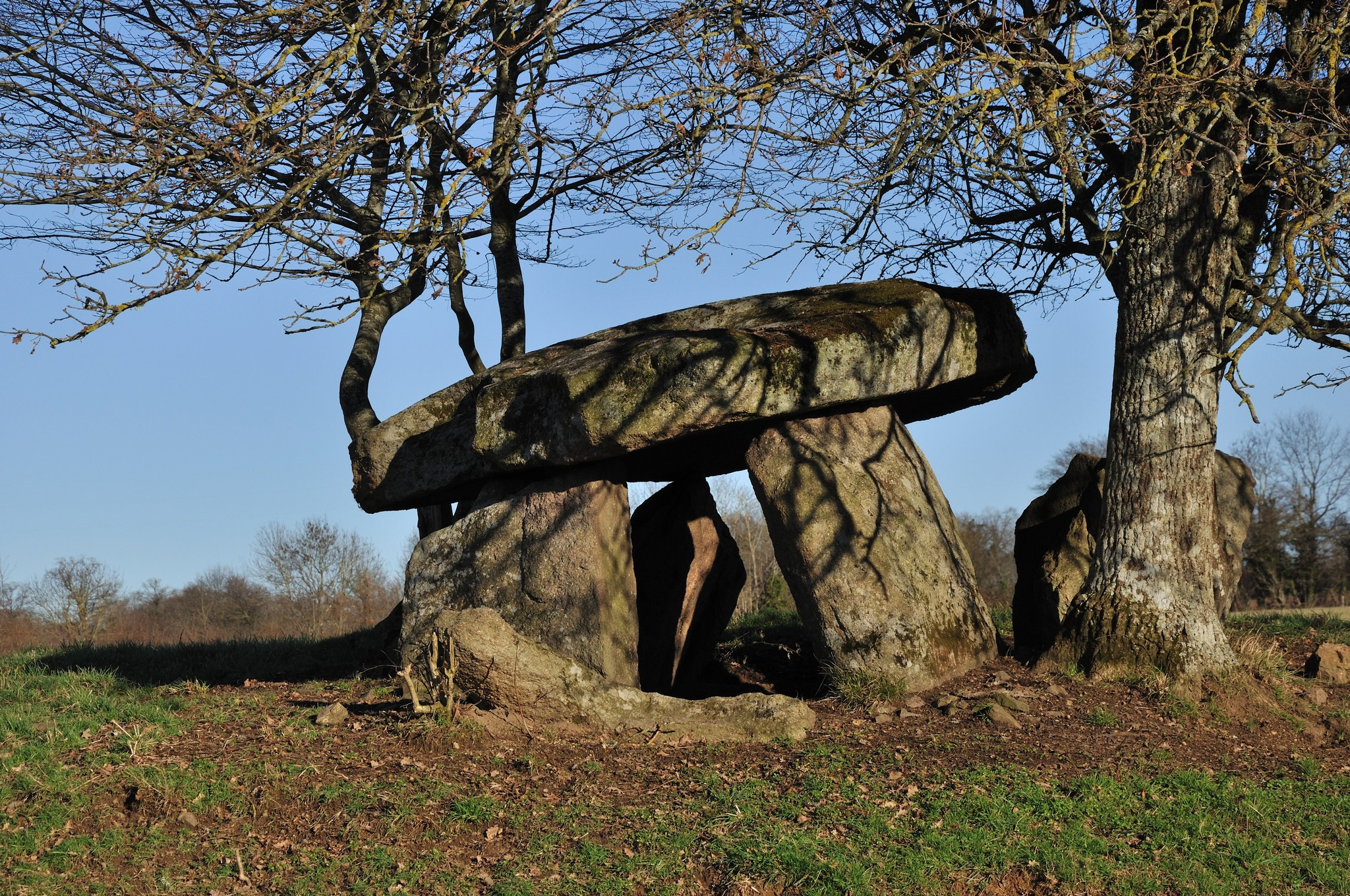 Dolmen, appelé "Pierre-à-la-Marte" (monument historique); Montchevrier (Indre)